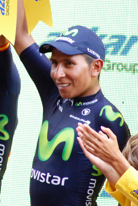 Vuelta a España 2015 | 8ª Etapa Puebla de Don Fadrique - Murcia-99